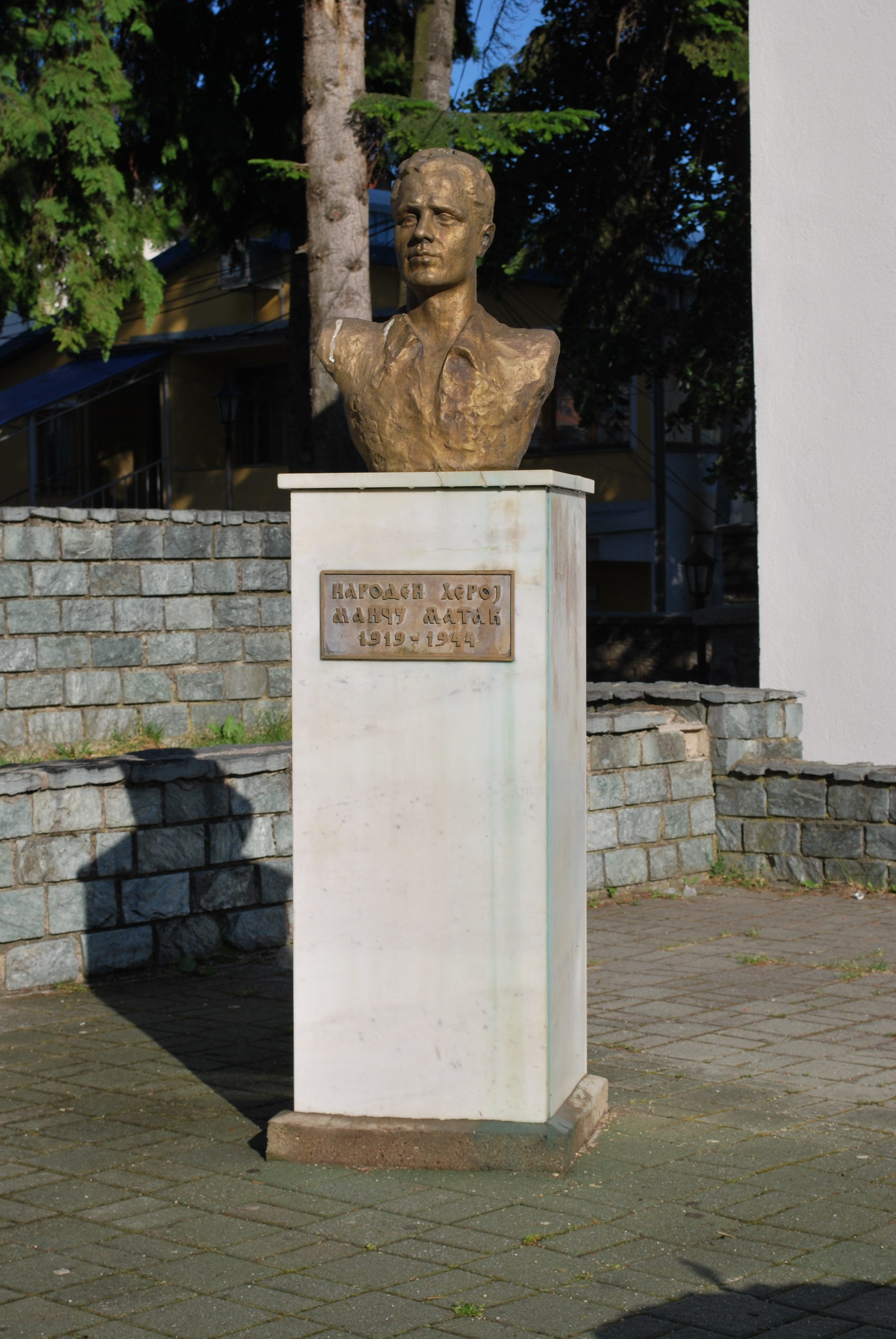 Manču Matak monument in Kruševo, Macedonia